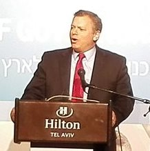 מנכ"ל משרד ראש הממשלה אלי גרונר מדבר בפני חבר הנאמנים של הסוכנות היהודית